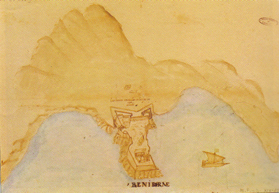 Plànol de la construcció del Castell de Benidorm dissenyat per Antonelli l'any 1575